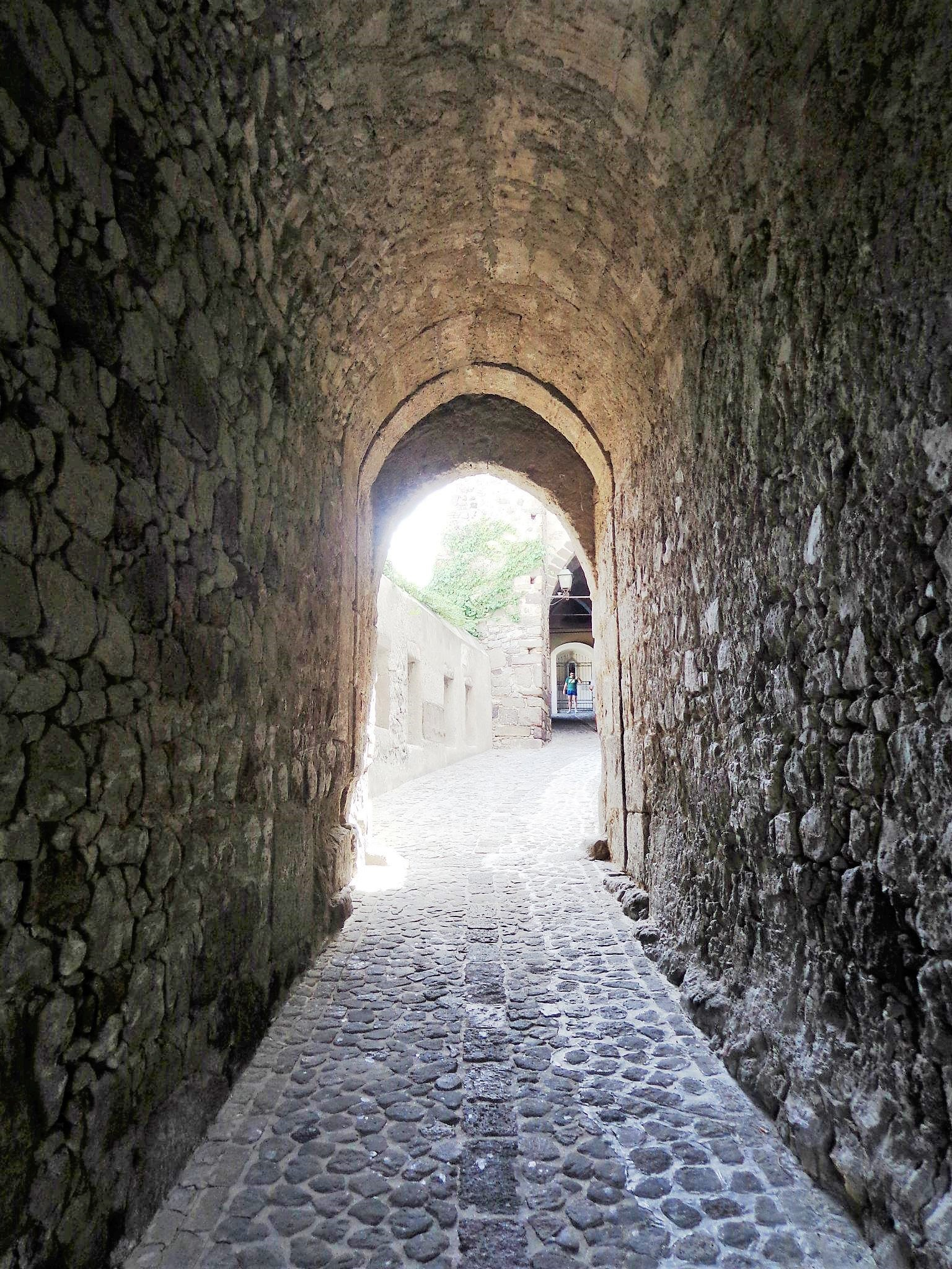 Accesso